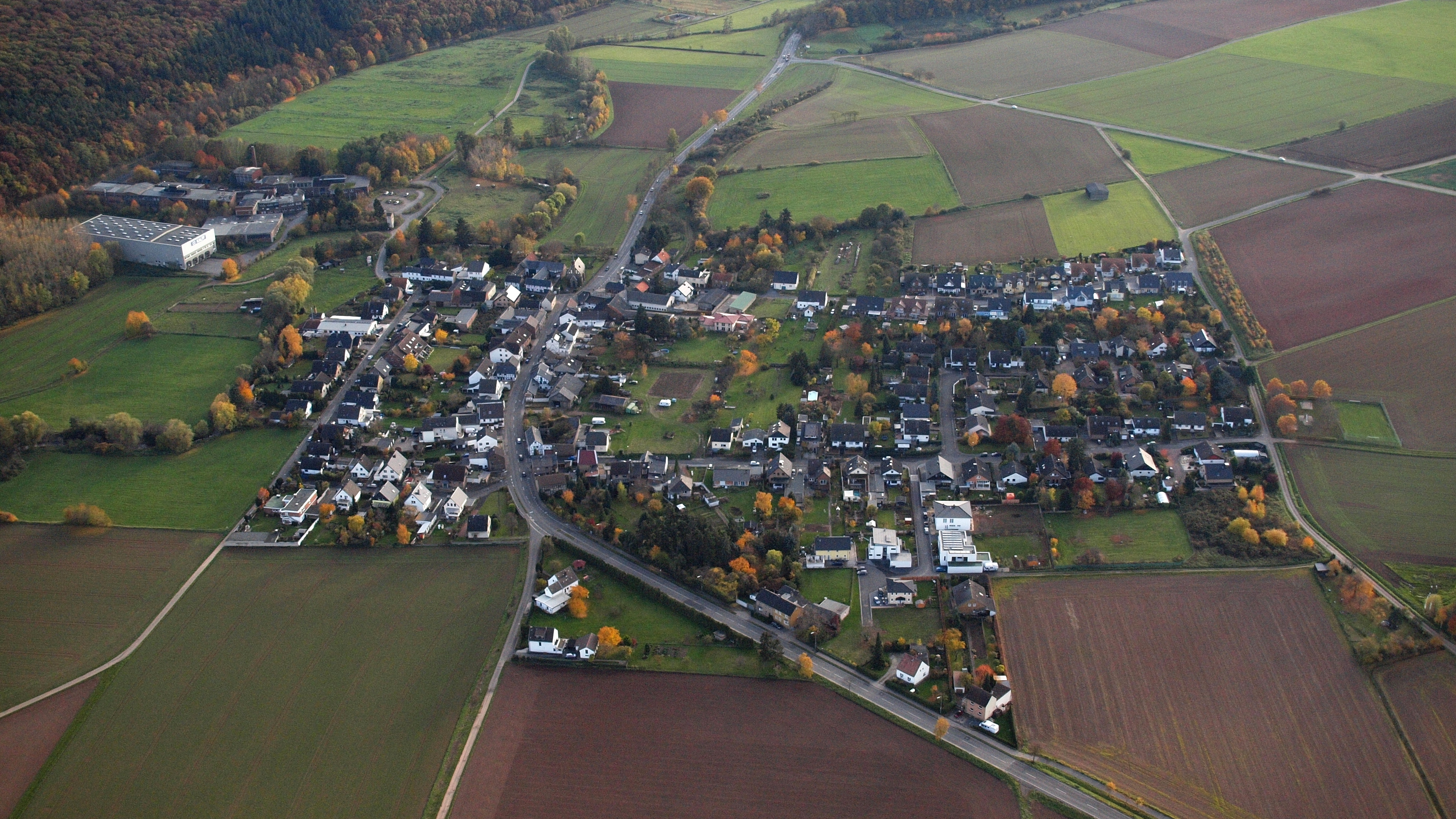 Rheder, Luftaufnahme (2015)